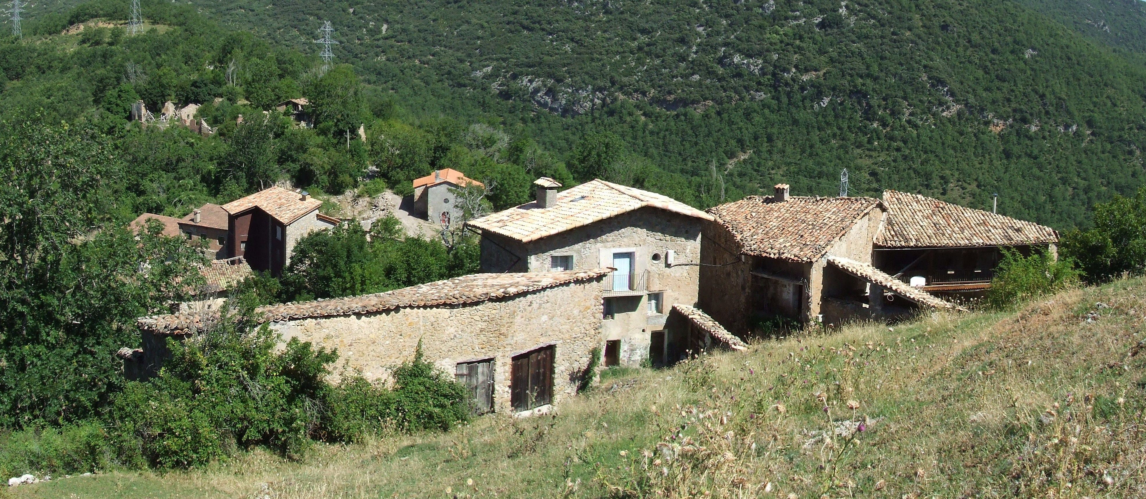 Panoràmica de Pinyana (Viu de Llevata, el Pont de Suert, Alta Ribagorça)